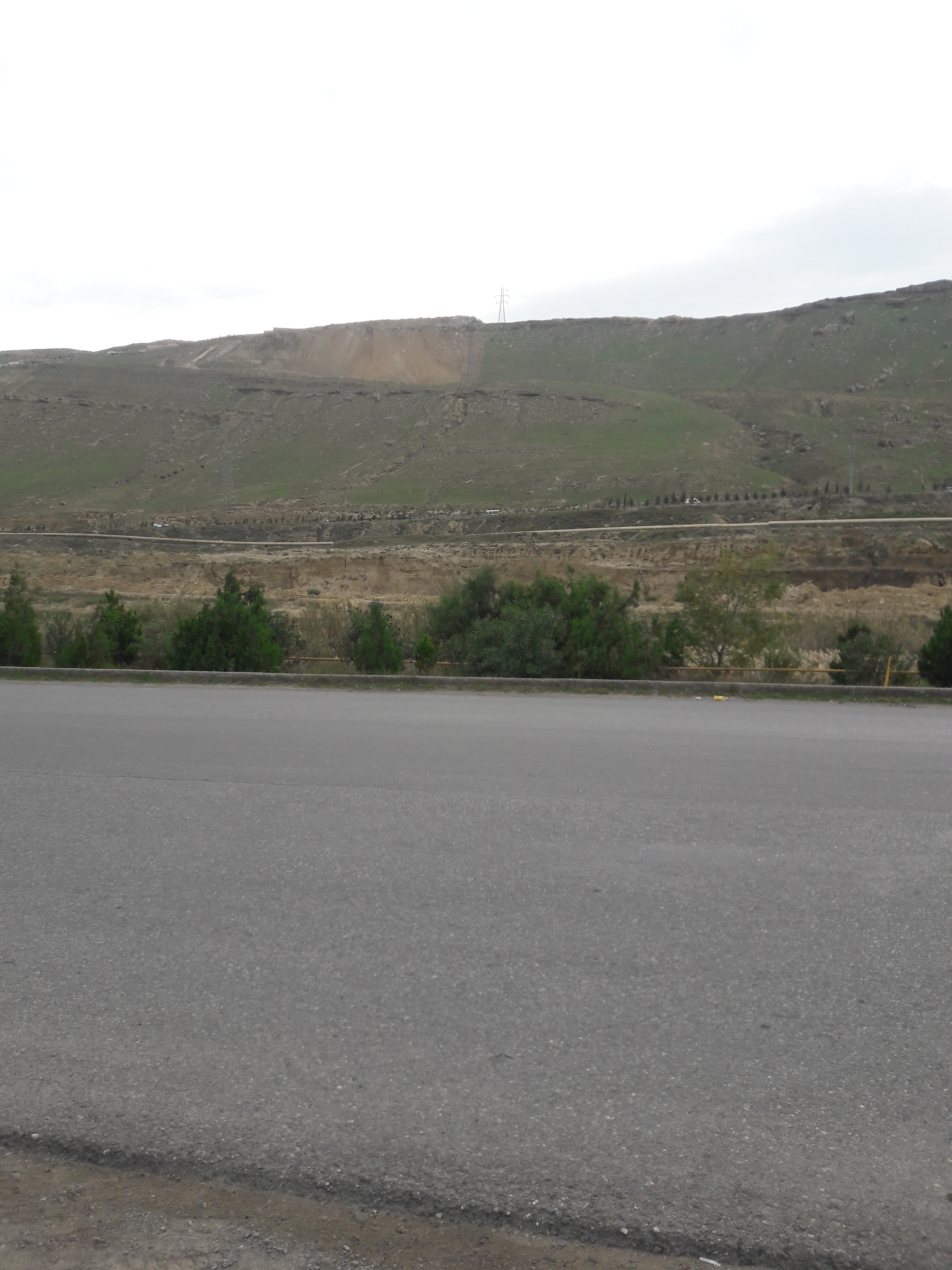 Badamdar dağları və Bakı dairəvi avtomobil yolu. 2017